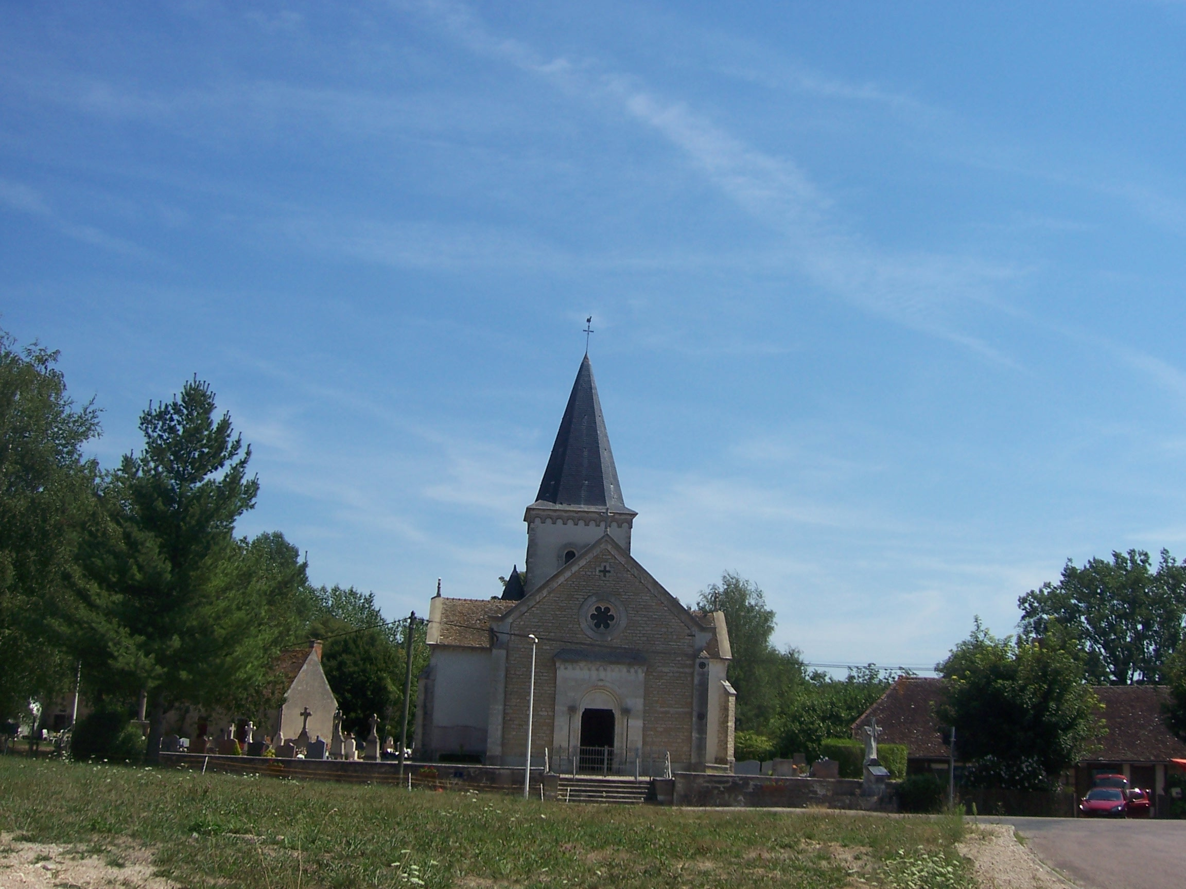 Eglise de Montcoy